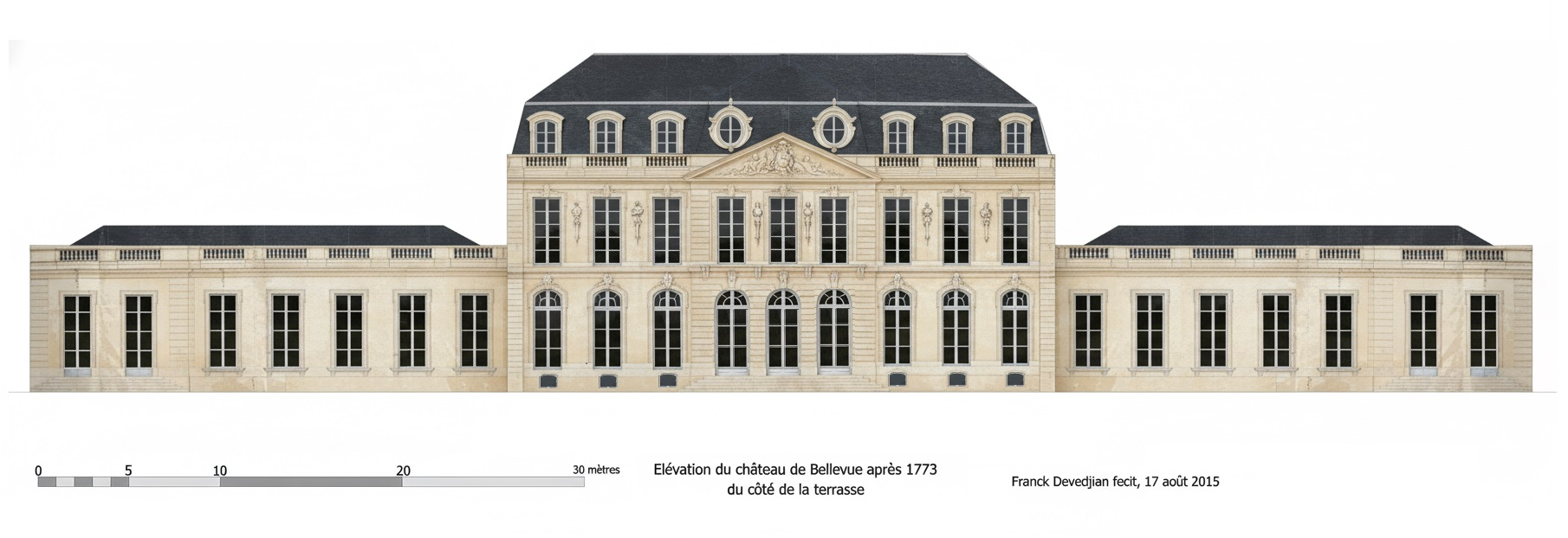 Restitution de l'élévation du château de Bellevue avec les agrandissements de 1773, ordonnés par Louis XV.